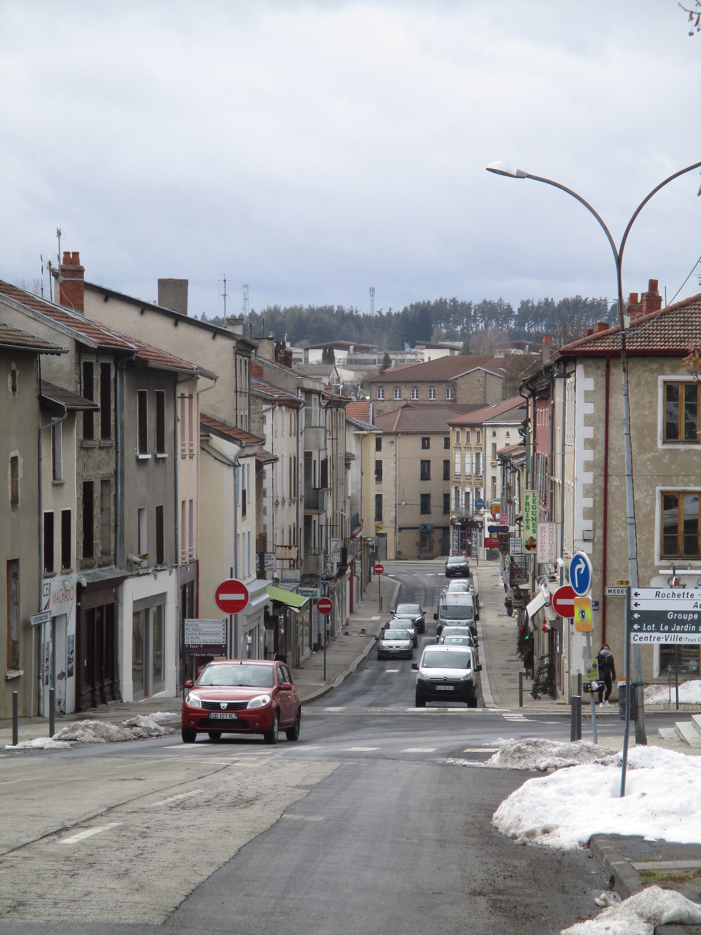 Boulevard du Nord Craponne sur Arzon